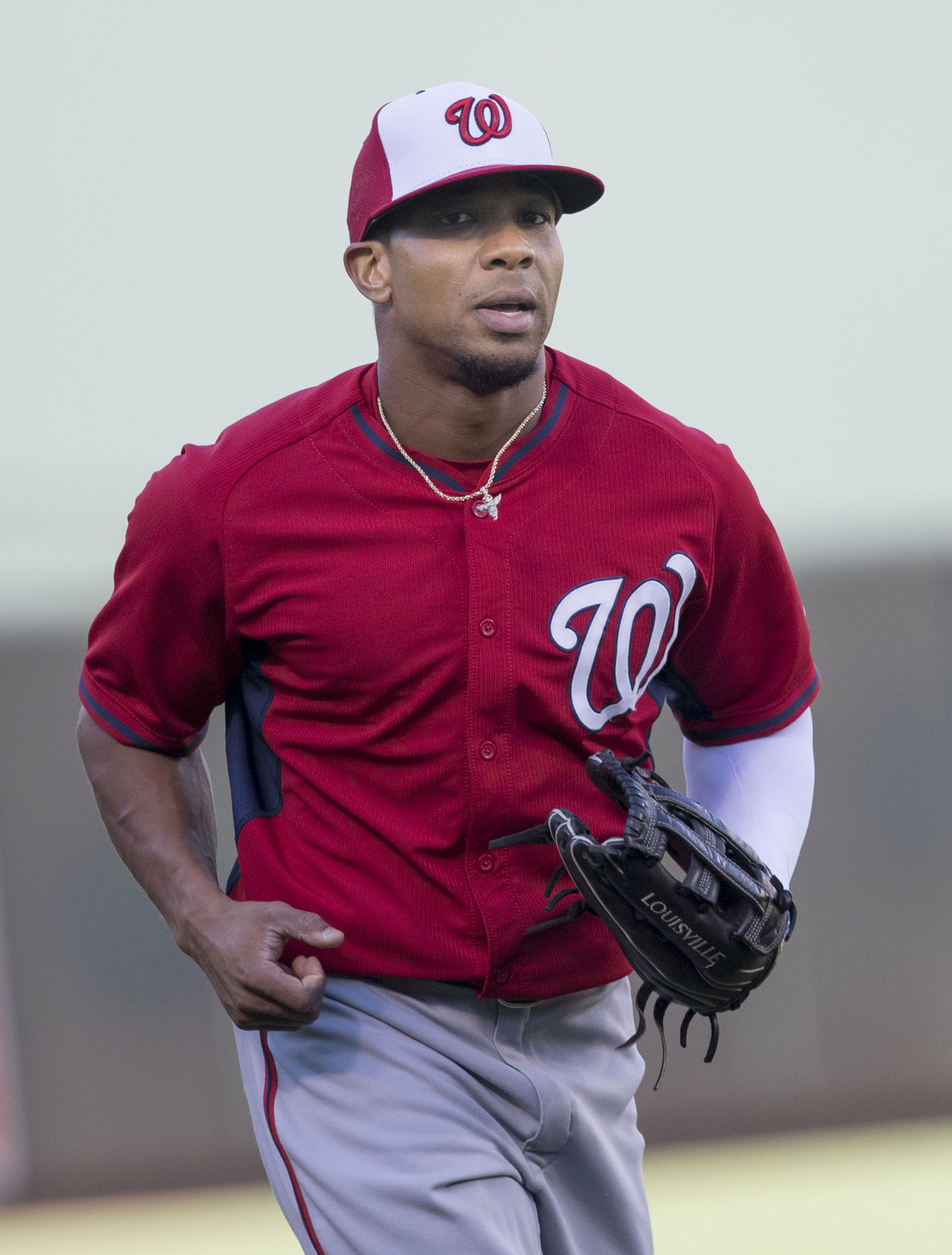 Ben Revere